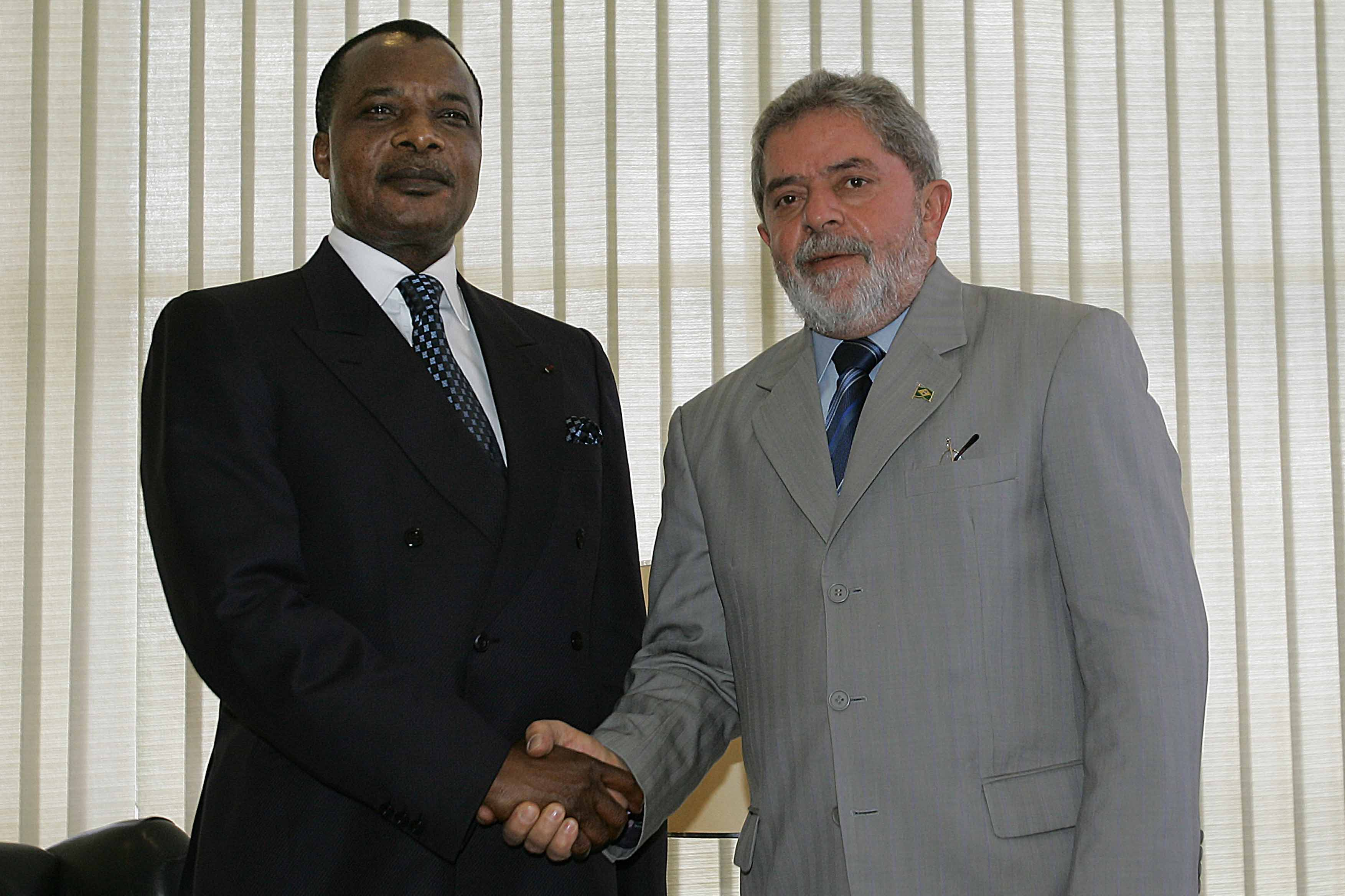 Brasília - Presidente Lula recebe o presidente do Congo, Denis Sassou Nguesso, no Palácio Itamaraty. (Foto Ricardo Stuckert/PR)